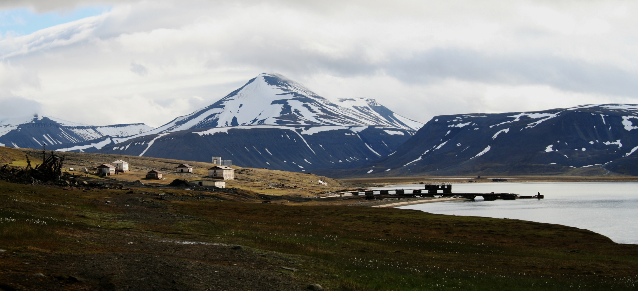 Colesbukta mit den Resten der Verladestation und Siedlung, Spitzbergen, Nordenskiöld Land